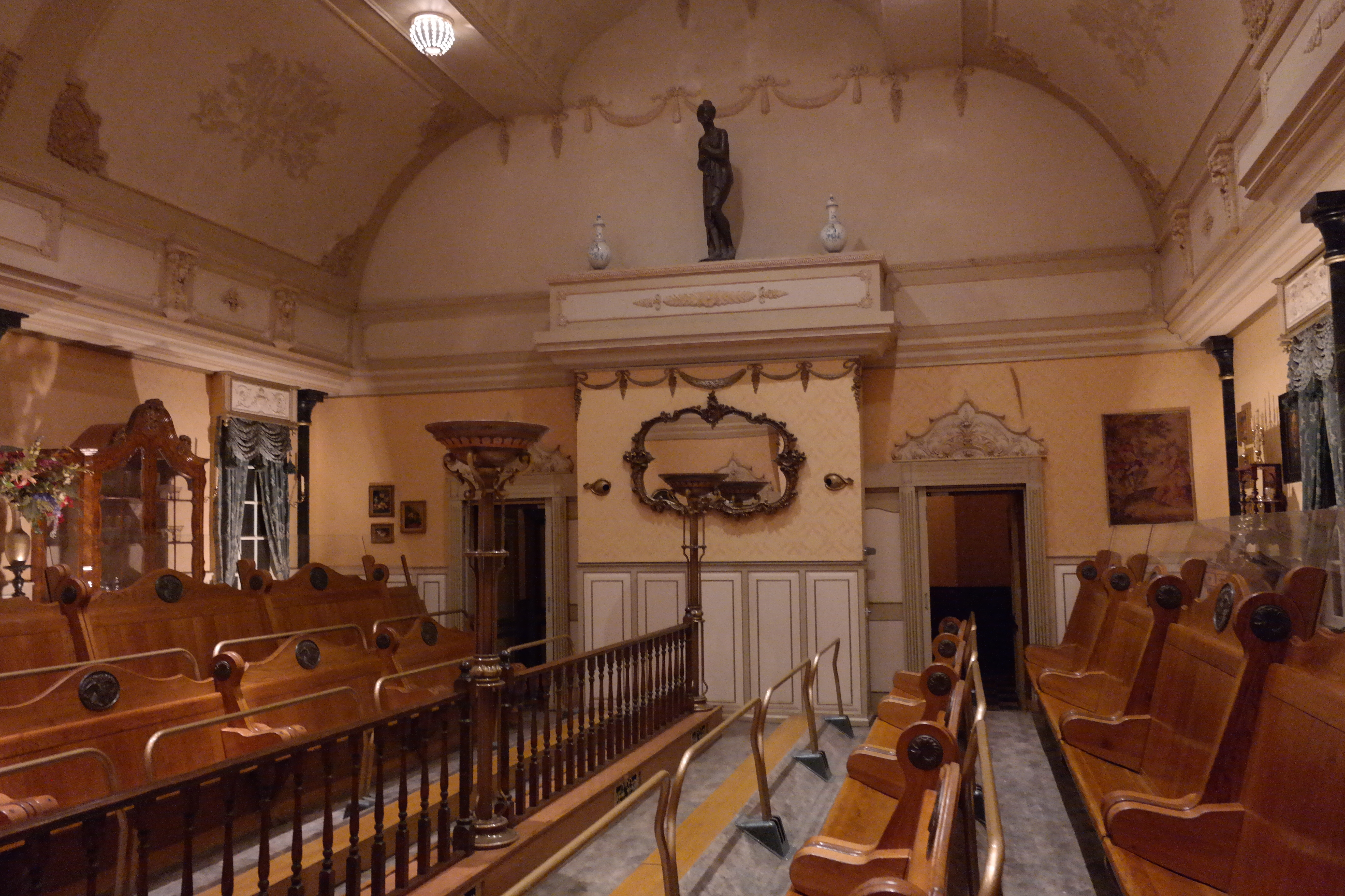 De binnenzijde van de Villa Volta-attractie in de Efteling.